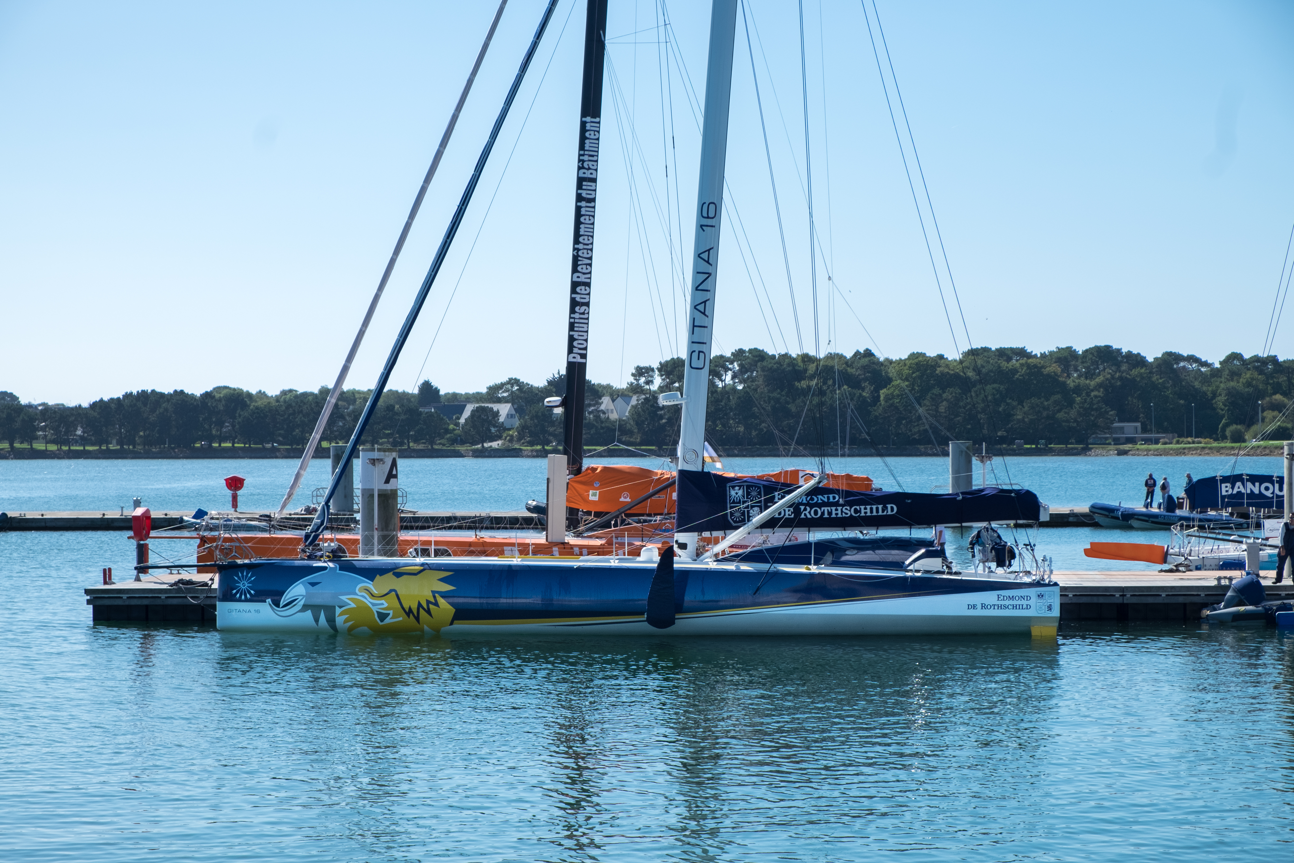 Le 60 pieds IMOCA Gitana 16, skippé par Sébastien Josse, dans le port de Lorient